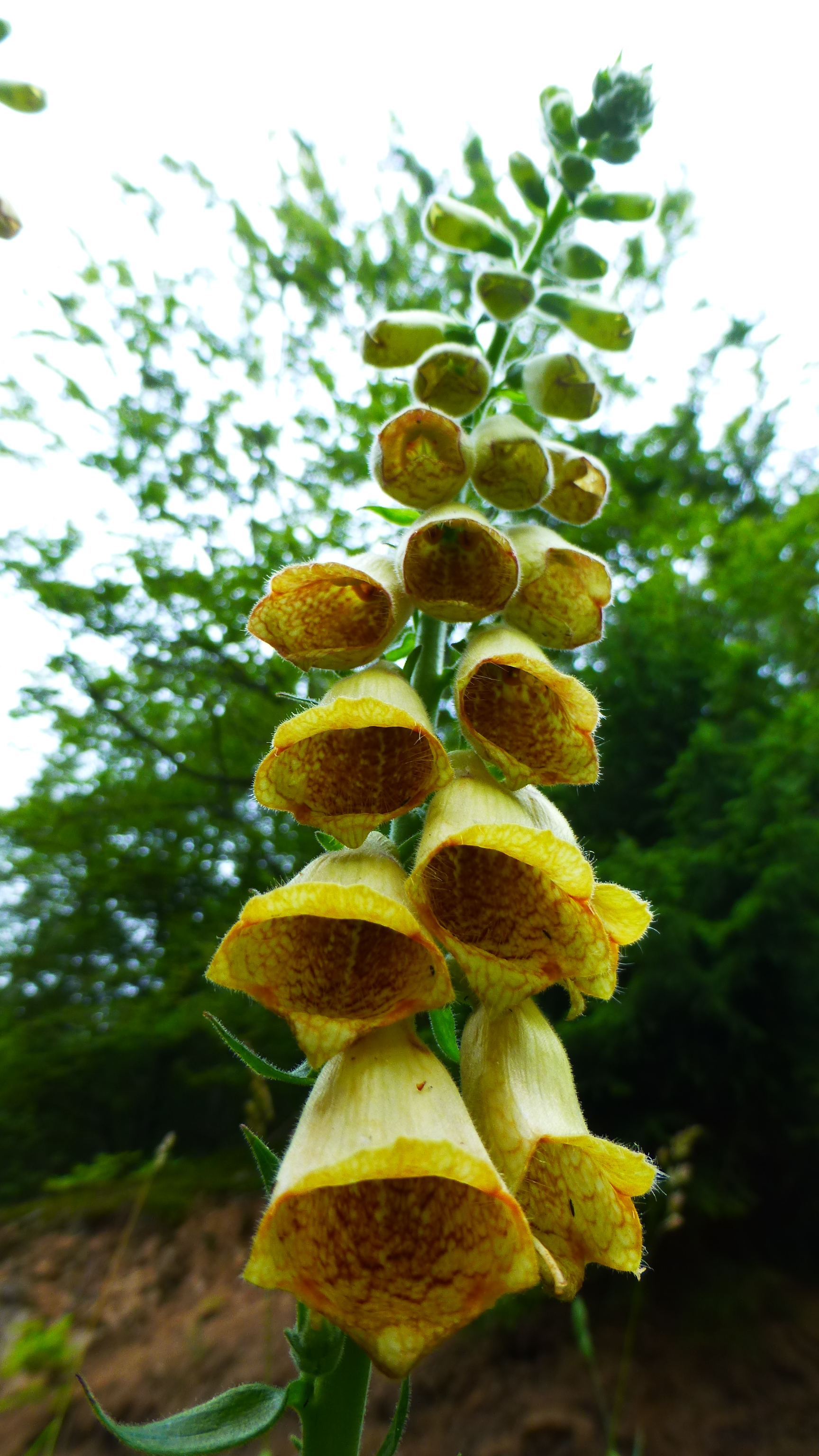 Fundort Wernigerode im Kalten Tal